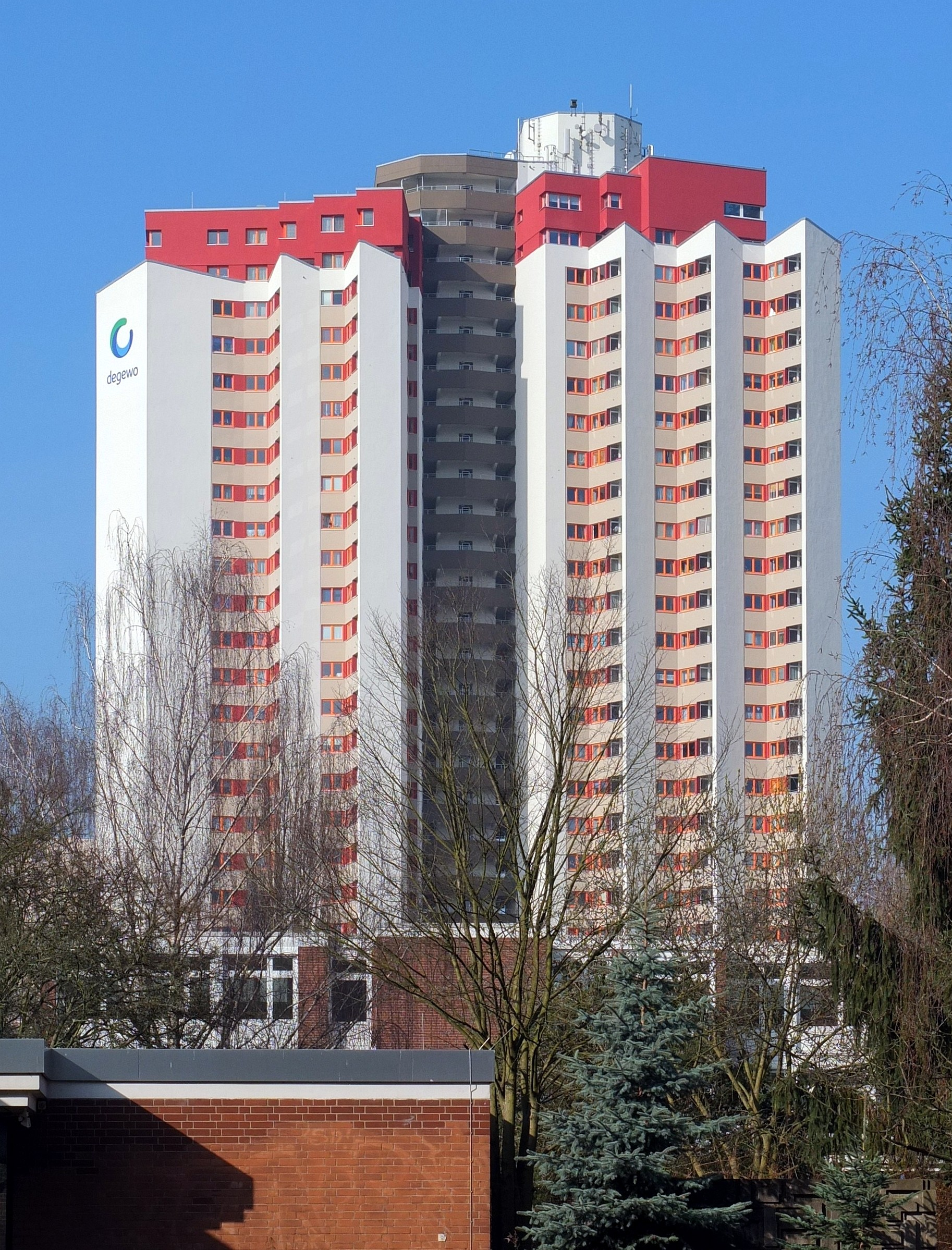 Wohnhochhaus Waldsassener Straße 29 in Berlin-Marienfelde, Architekt: Manfred Joachim Hinrichs.